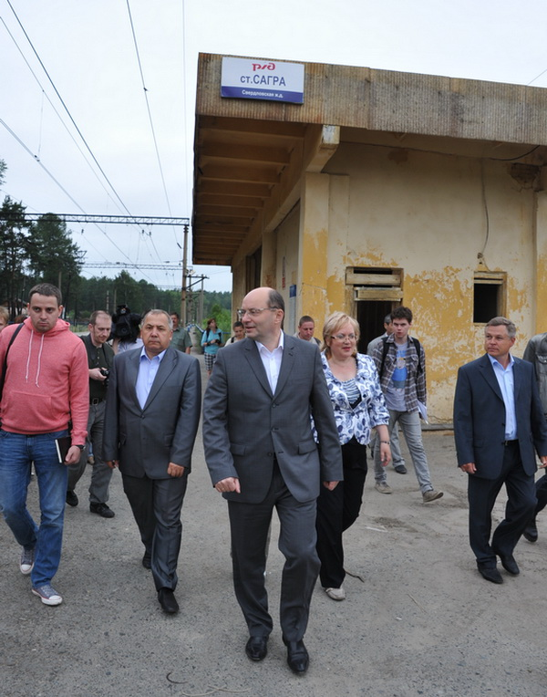 Alexander Misharin in Sagra